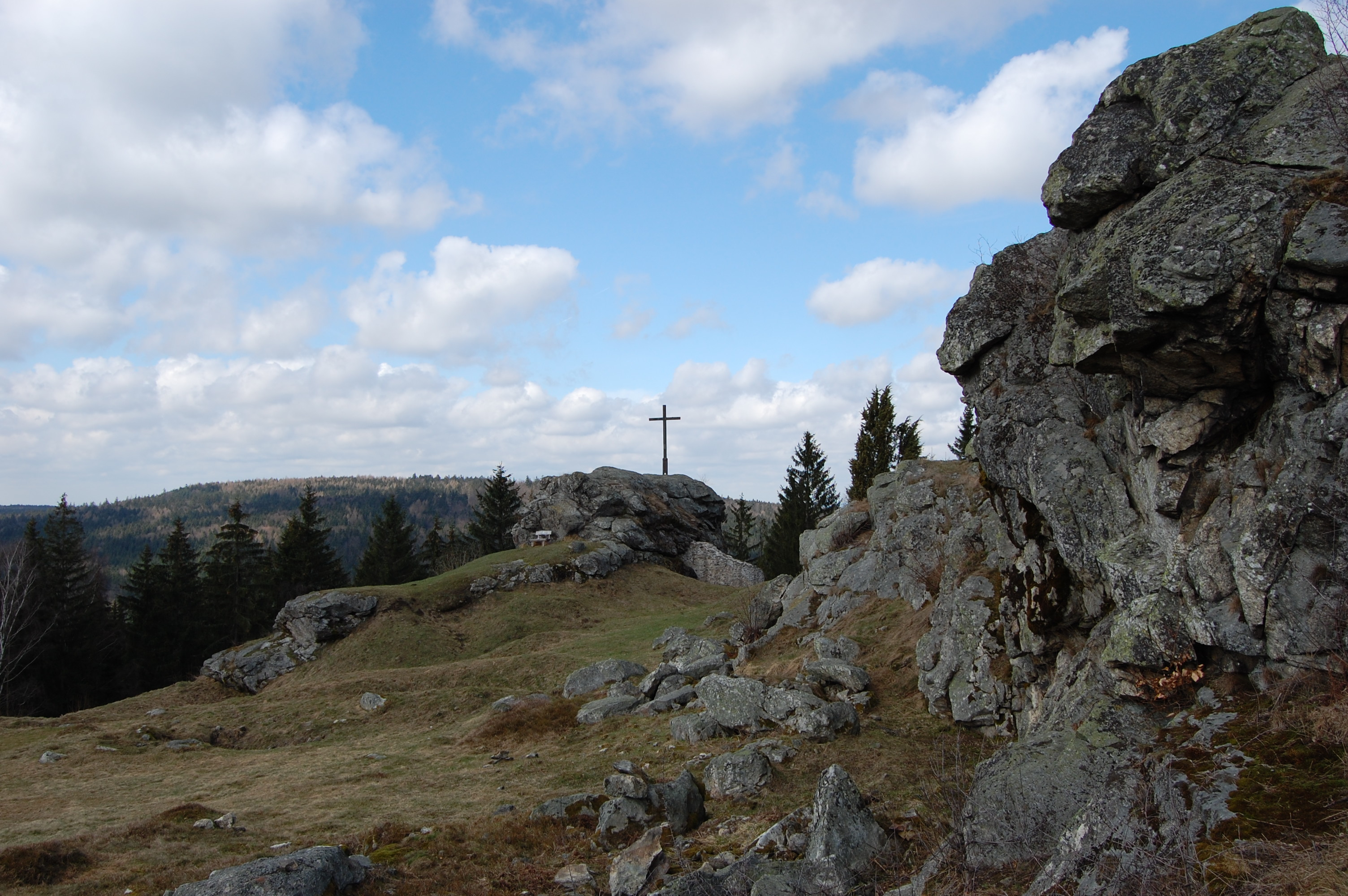 Burgstall Wildstein (744 m NN), Gemeinde Teunz, Landkreis Schwandorf, Oberpfalz, Bayern